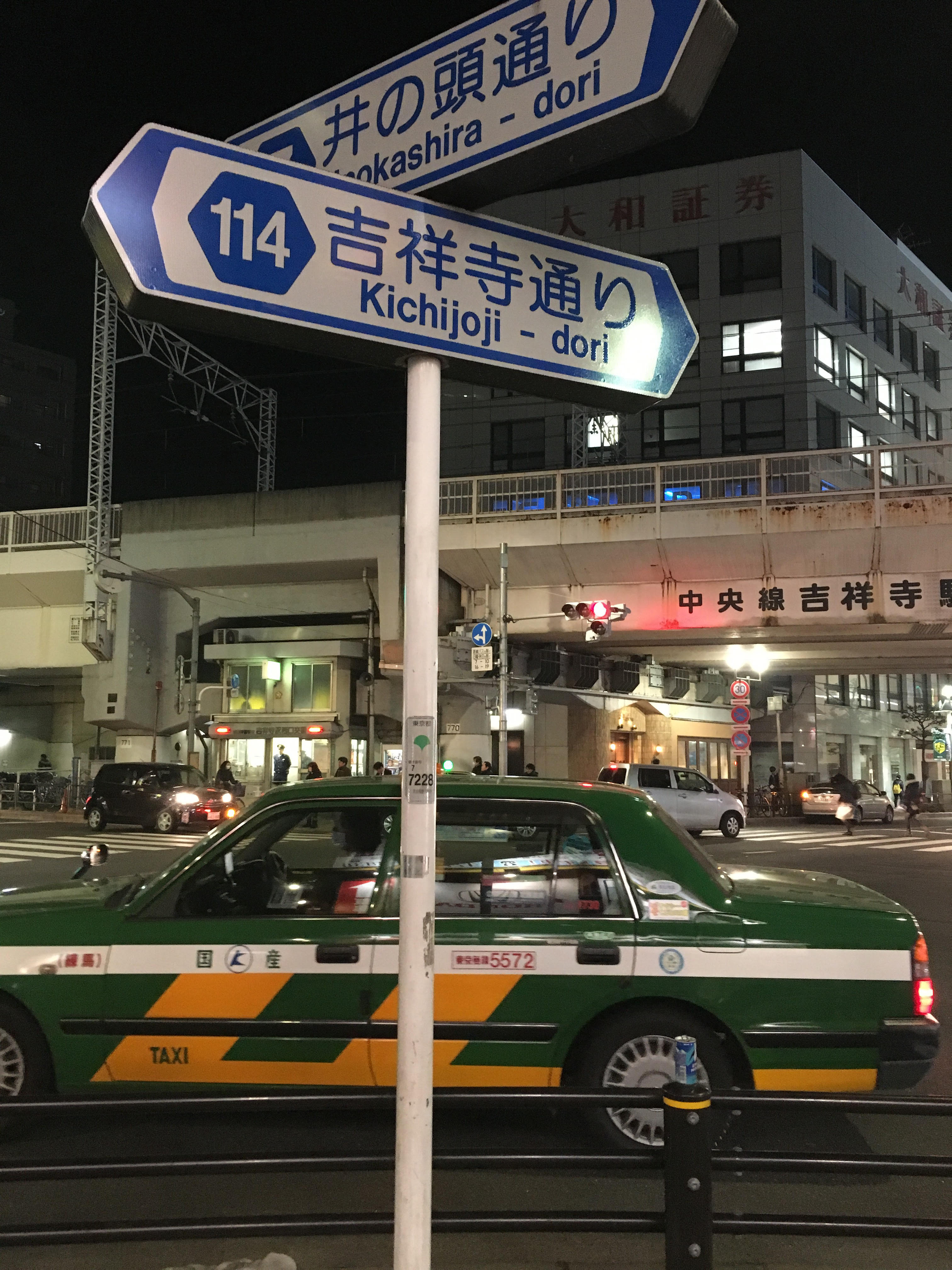 吉祥寺駅前の交差点標識